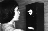 А.Монастырский. "Палец". 1977